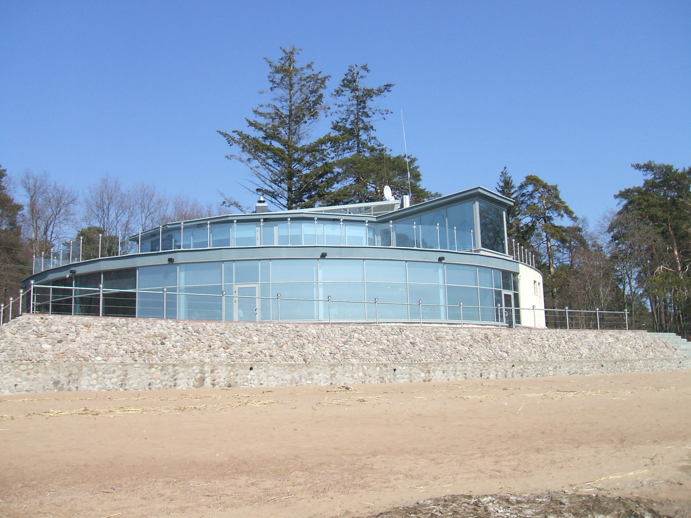 Ресторан на Приморском шоссе при выезде из Зеленогорска, на берегу Финского залива.